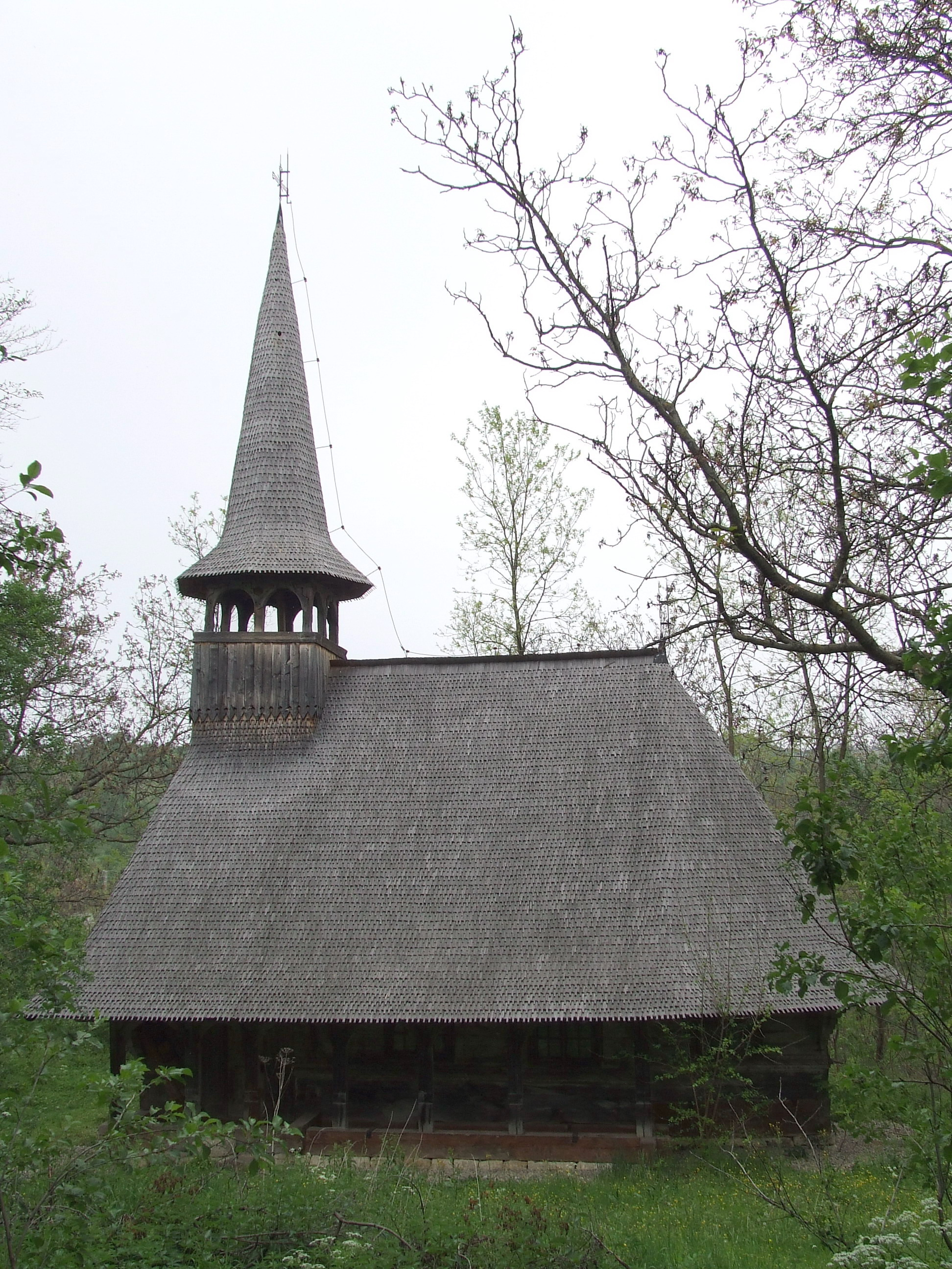 Biserica de lemn din Nadiş, Sălaj. Autor: Bogdan Ilieş Data: mai 2007